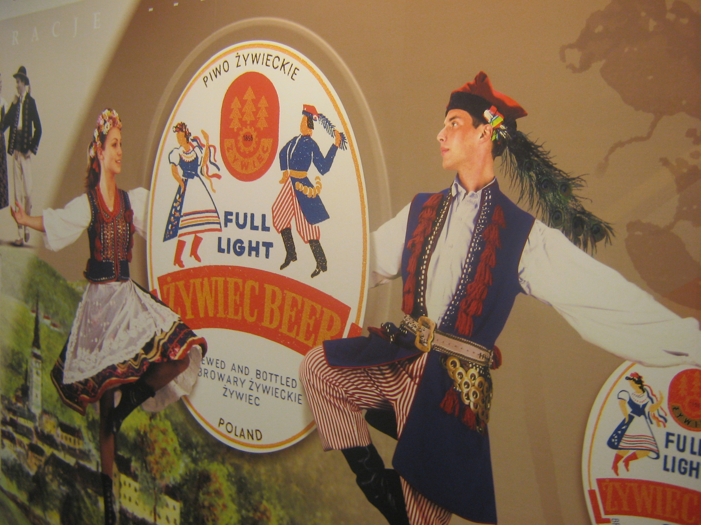 Zdjęcie-eksponat z Muzeum Browaru w Żywcu